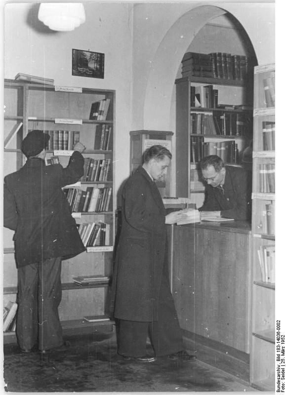 Olbernhau, Blick in die Stadtbibliothek Zentralbild Seidel 25.3.52 Olbernhau. Blick in die Stadtbibliothek, die ca 2.200 Bände umfaßt. Leihweise Zentral Bild